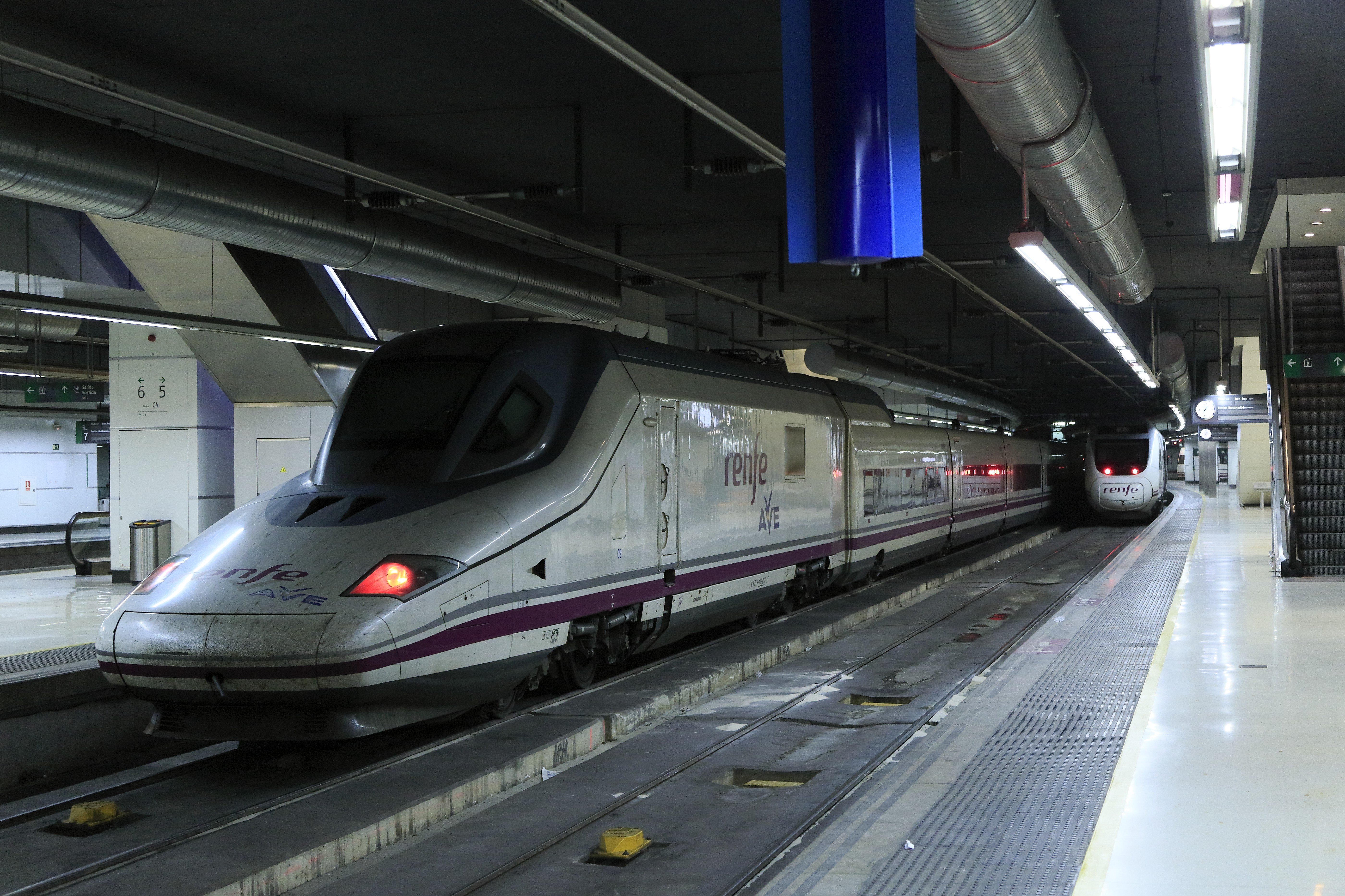 Talgo 350, Triebzug aus Mittelwagen der Bauart Talgo 7 mit zusätzlicher Primärfederung und zwei Triebköpfen. Die Einheiten sind regelspurig und nicht spurwechselfähig. Die Maschine im Bild trägt die vollständige Fahrzeugnummer 98 71 9 102 017. Rechts hinten eine Einheit der BR 121.